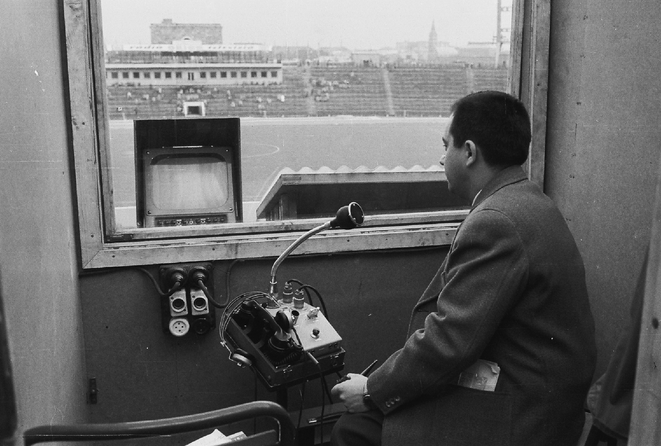 Az MTV riporterállásában Vitray Tamás sportriporter